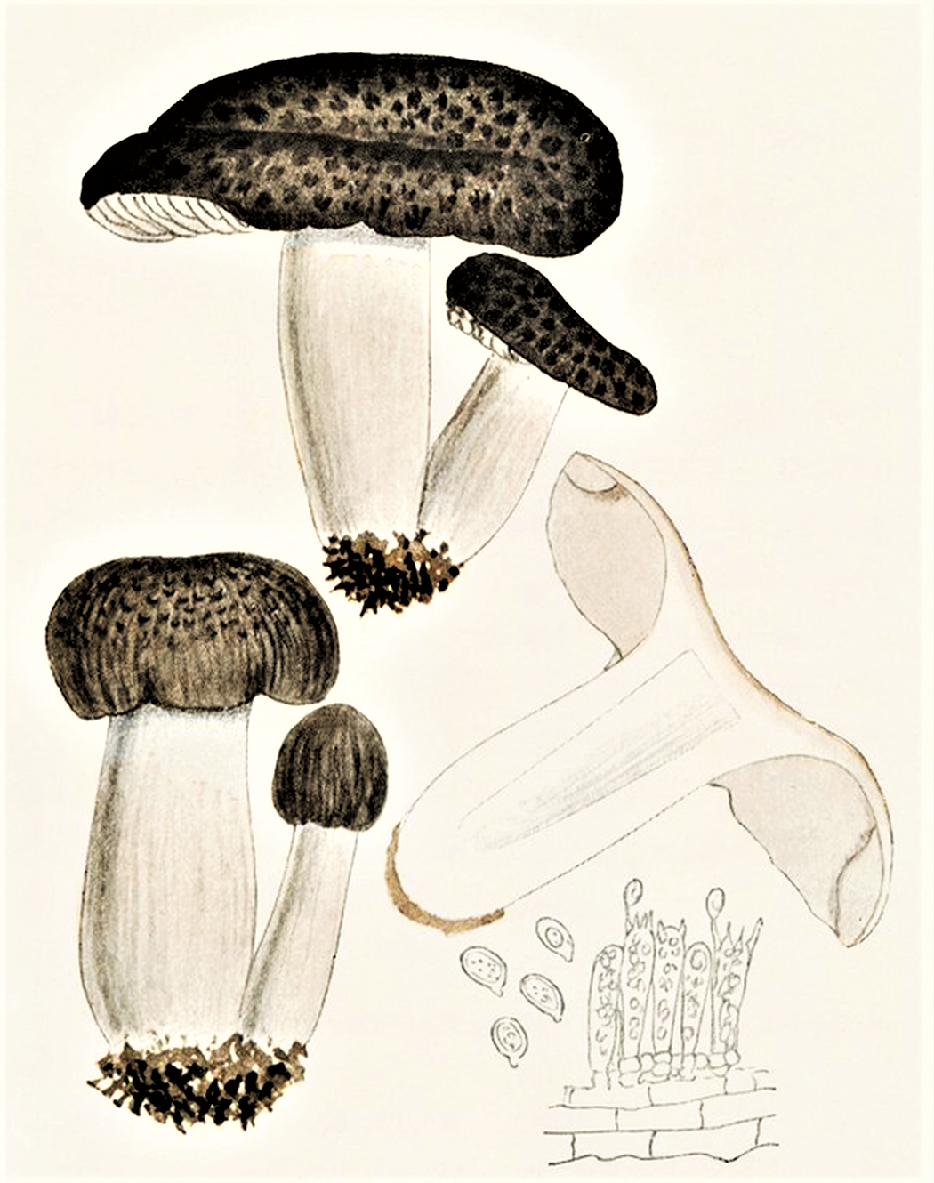 Bres.: Tricholoma atro-squamosum Chevall. (1837)